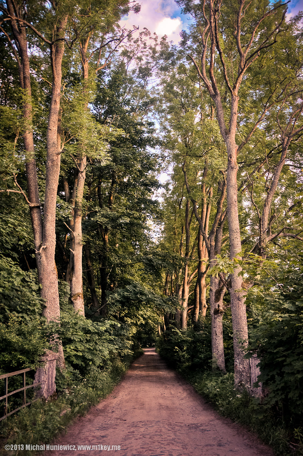 Droga leśna w Dobrocinie, niedaleko drogi 519.